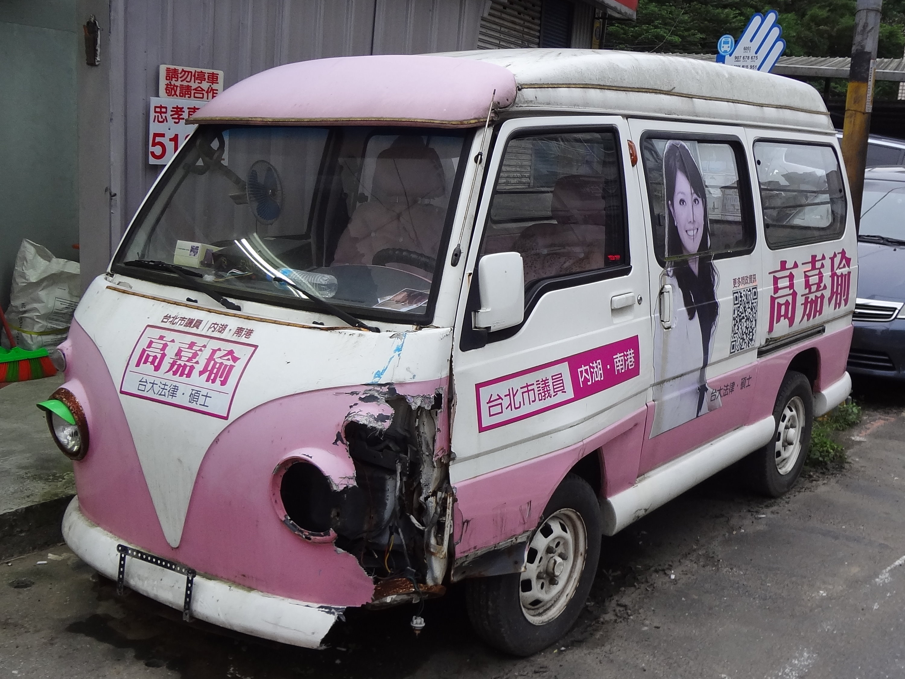 新北市汐止區忠孝東路，廢棄的民主進步黨臺北市議員高嘉瑜中華威利行動服務車左前方外觀。